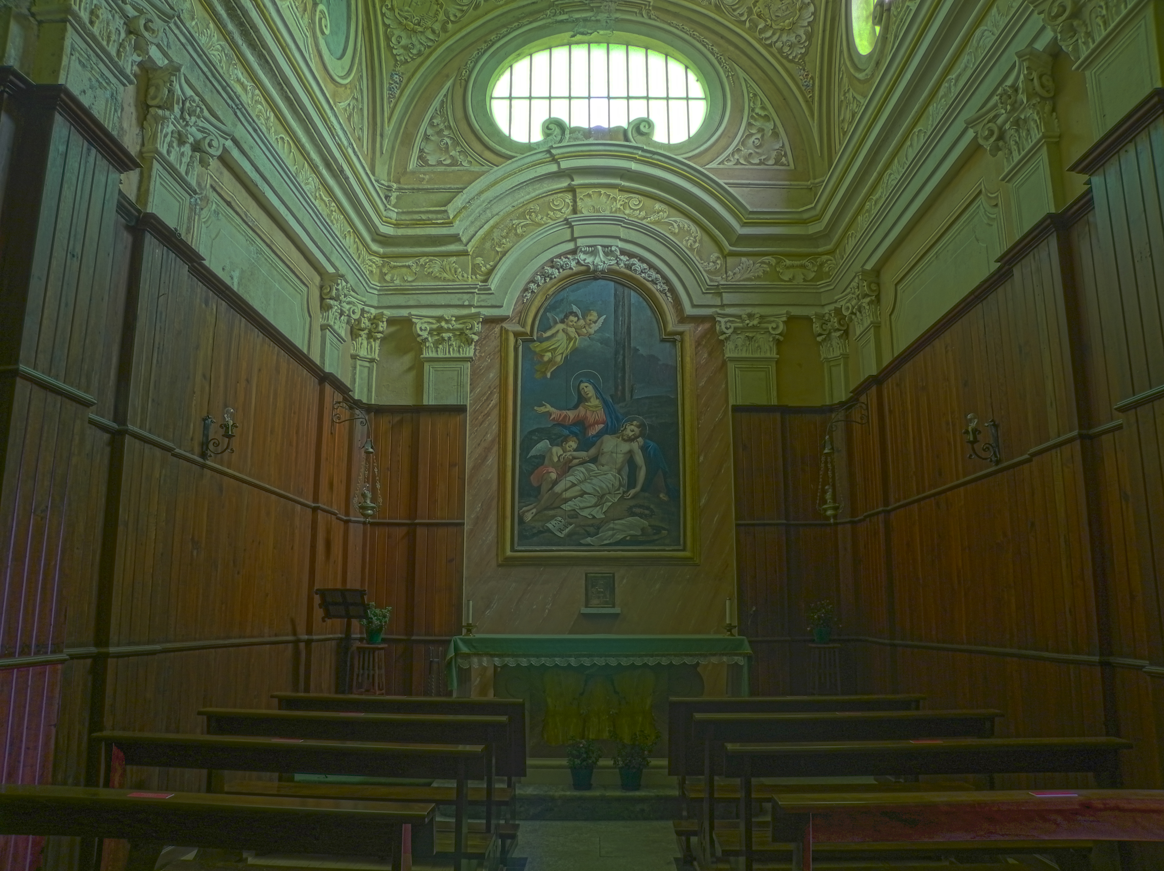 Interno della Cappella laterale